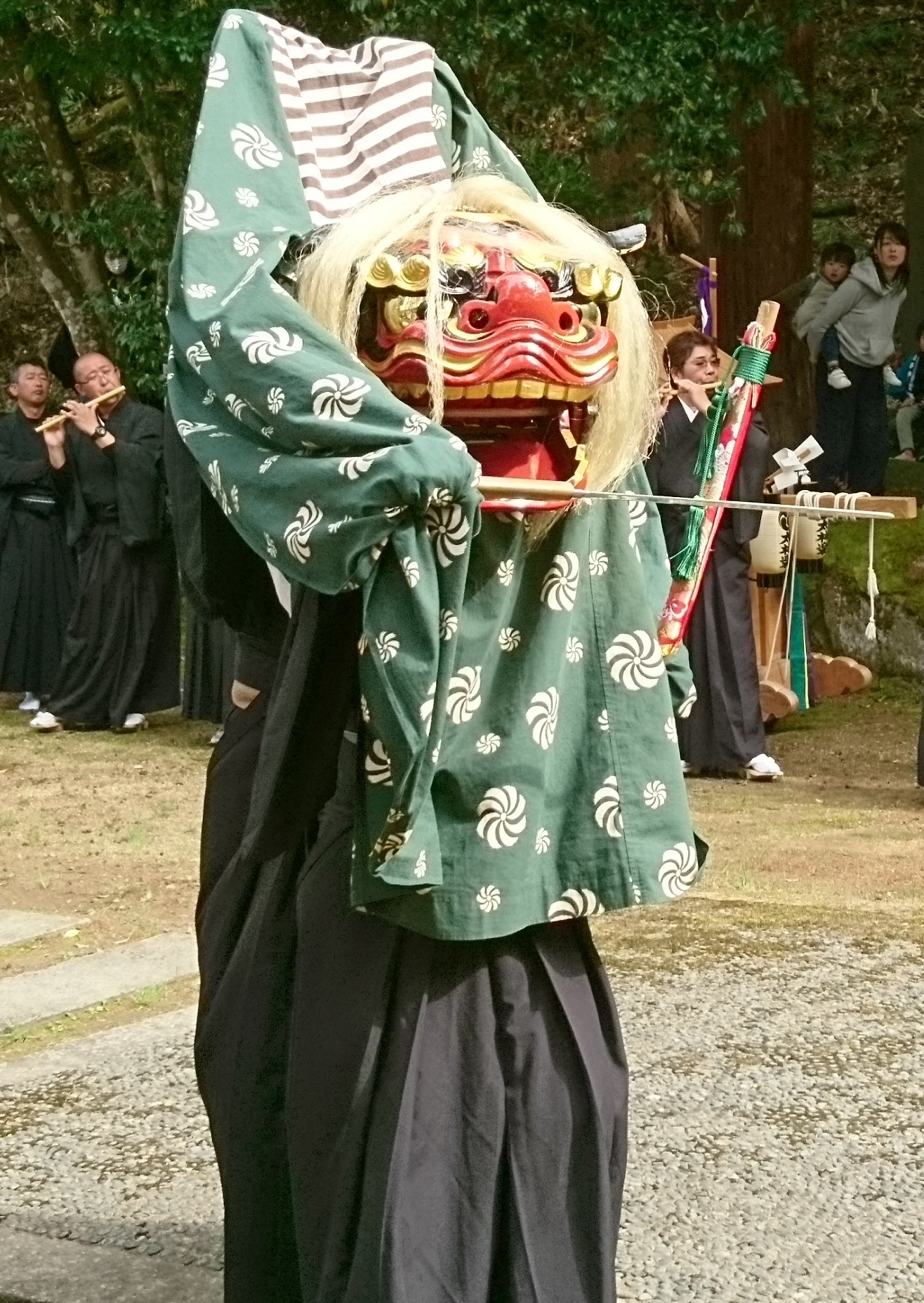 与謝野町 阿知江𡶌部神社